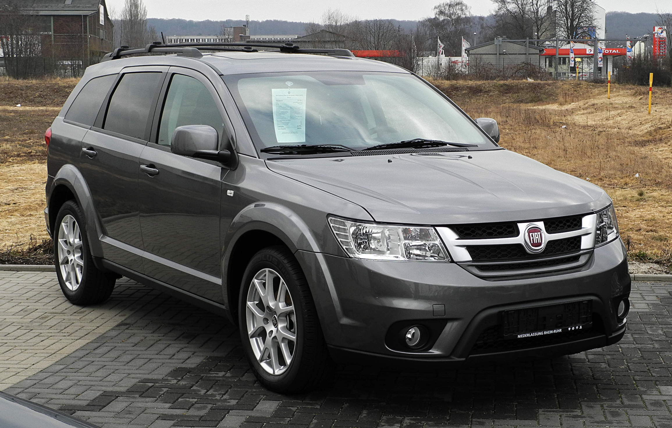 Fiat Freemont 2.0 16V Multijet Urban